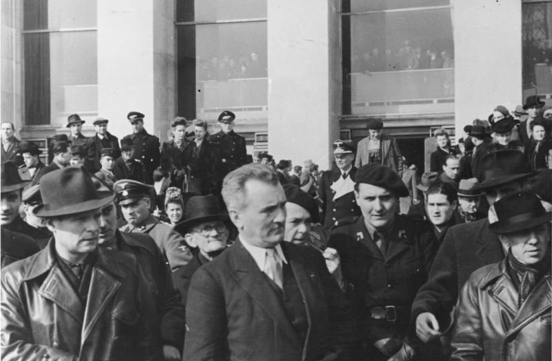 This description has been identified as biased or incorrect: Original Nazi-propaganda descriptionDas neue Frankreich Joseph Darnand, Generalsekretär der französischen Miliz, beim Verlassen einer großen Massenveranstaltung im Trocadero in Paris. Er ist umgeben von seinen nächsten Mitarbeitern innerhalb der Miliz. Foto: PK-Kempe/Transocean-Europapress (G) Juli 1944